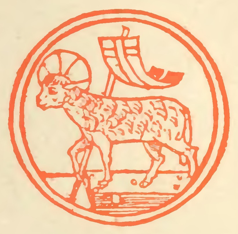 Cinq prières pour le temps de la guerre